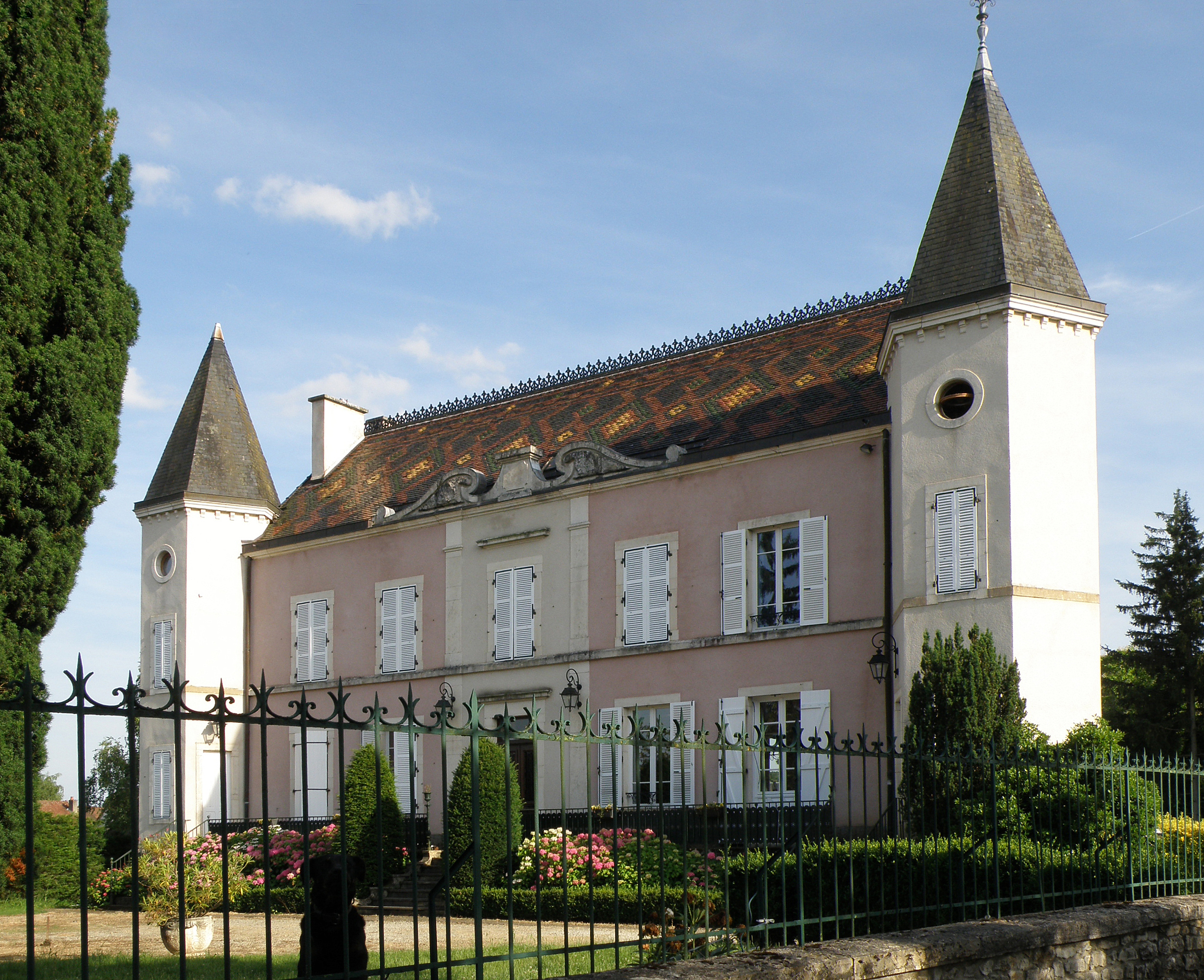 Paris-l'Hôpital (Saône-et-Loire, Bourgogne, France). Château, route de Créot. Façade principale (nord).